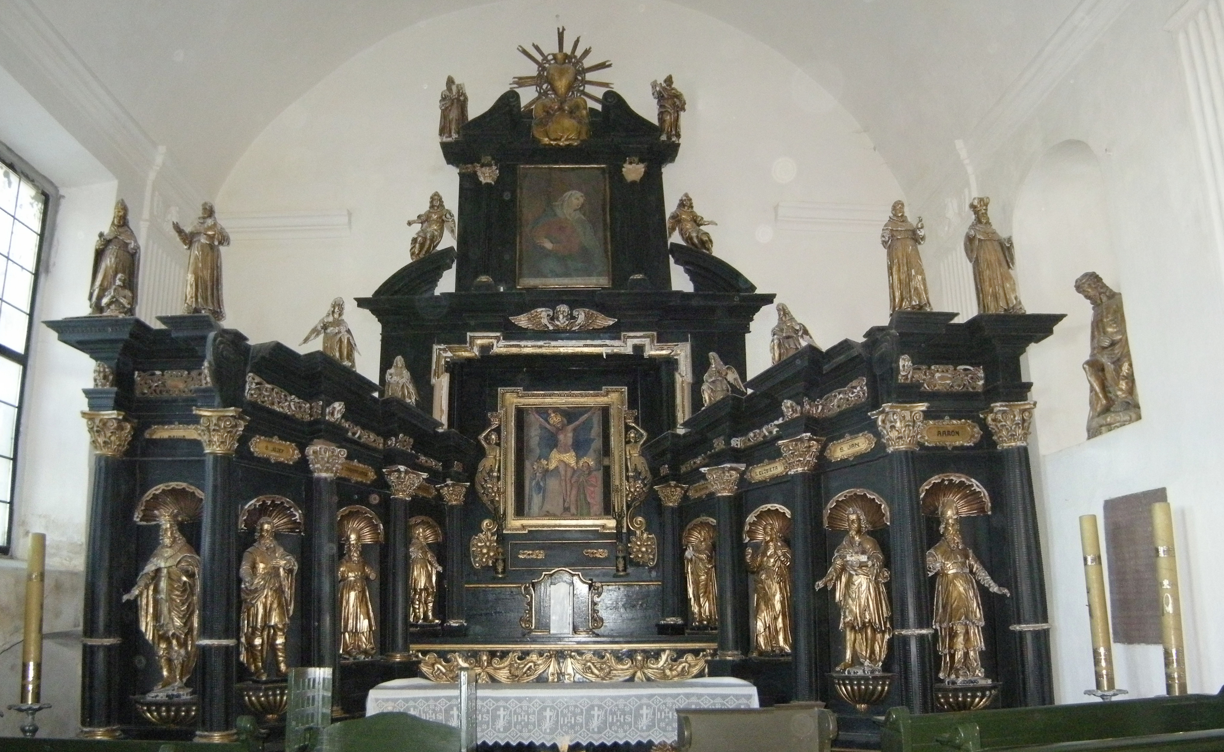 Беларуская (тарашкевіца): Комплекс былога кляштара бэрнардынцаў, дэкаратыўнае аздабленьне касьцёла: галоўны і бакавыя алтары росьпісы. в. Будслаў This is a photo of Belarusian heritage monument. Reference number: 611Г000422 ( WLM)